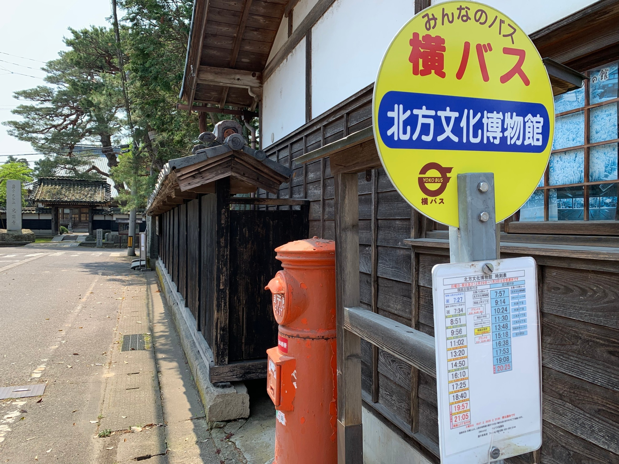 横越地区住民バス「横バス」 北方文化博物館前停留所（2020年5月）